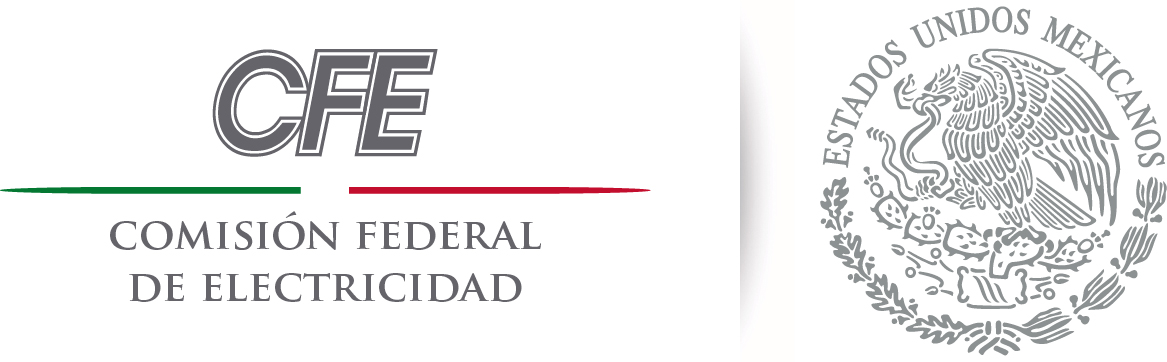 Logo CFE Oficial